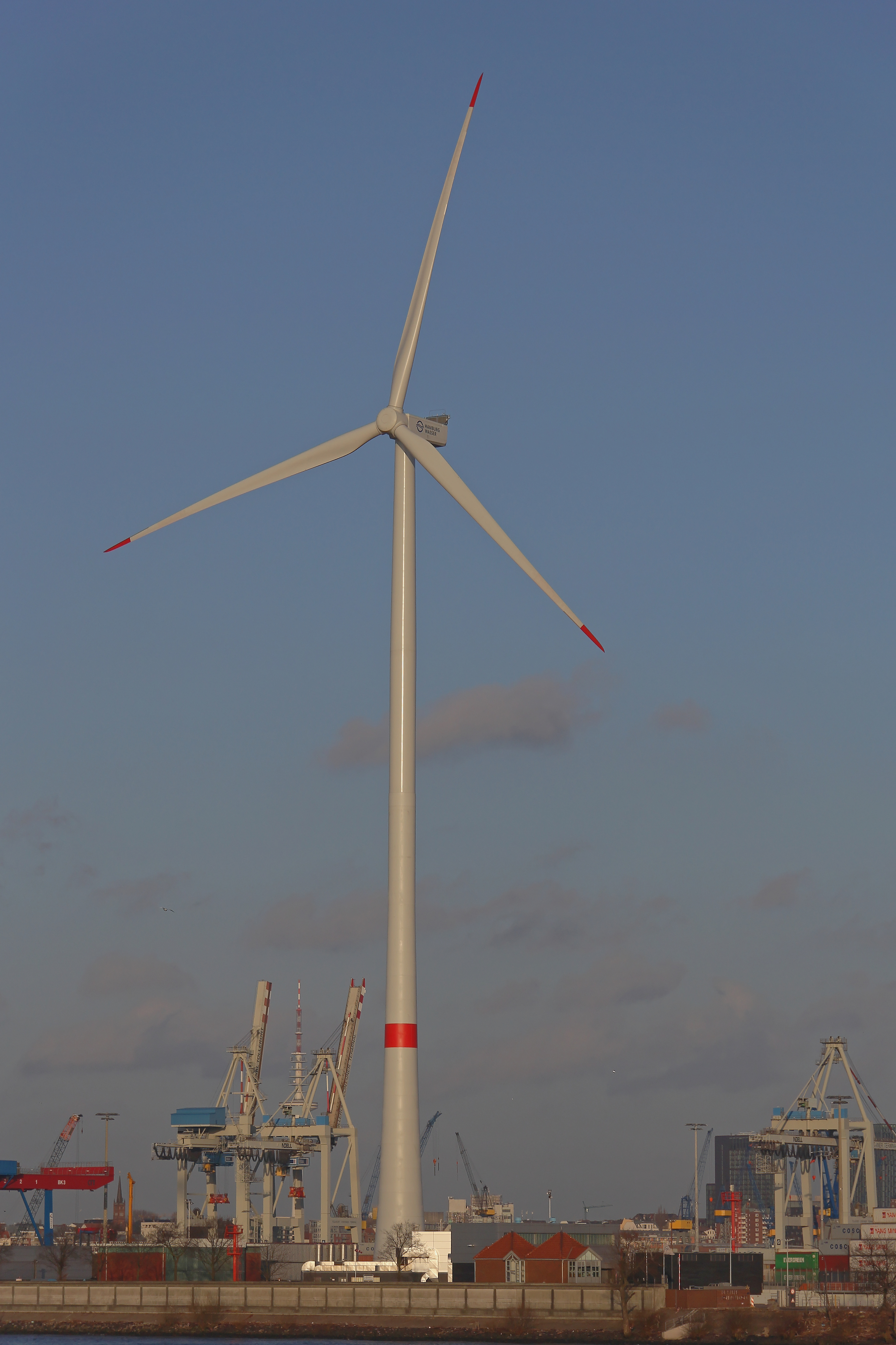 Windturbine des Typs Nordex N117/3000 auf 141-m-Hybridturm auf dem Gelände von Hamburg Wasser in Steinwerder